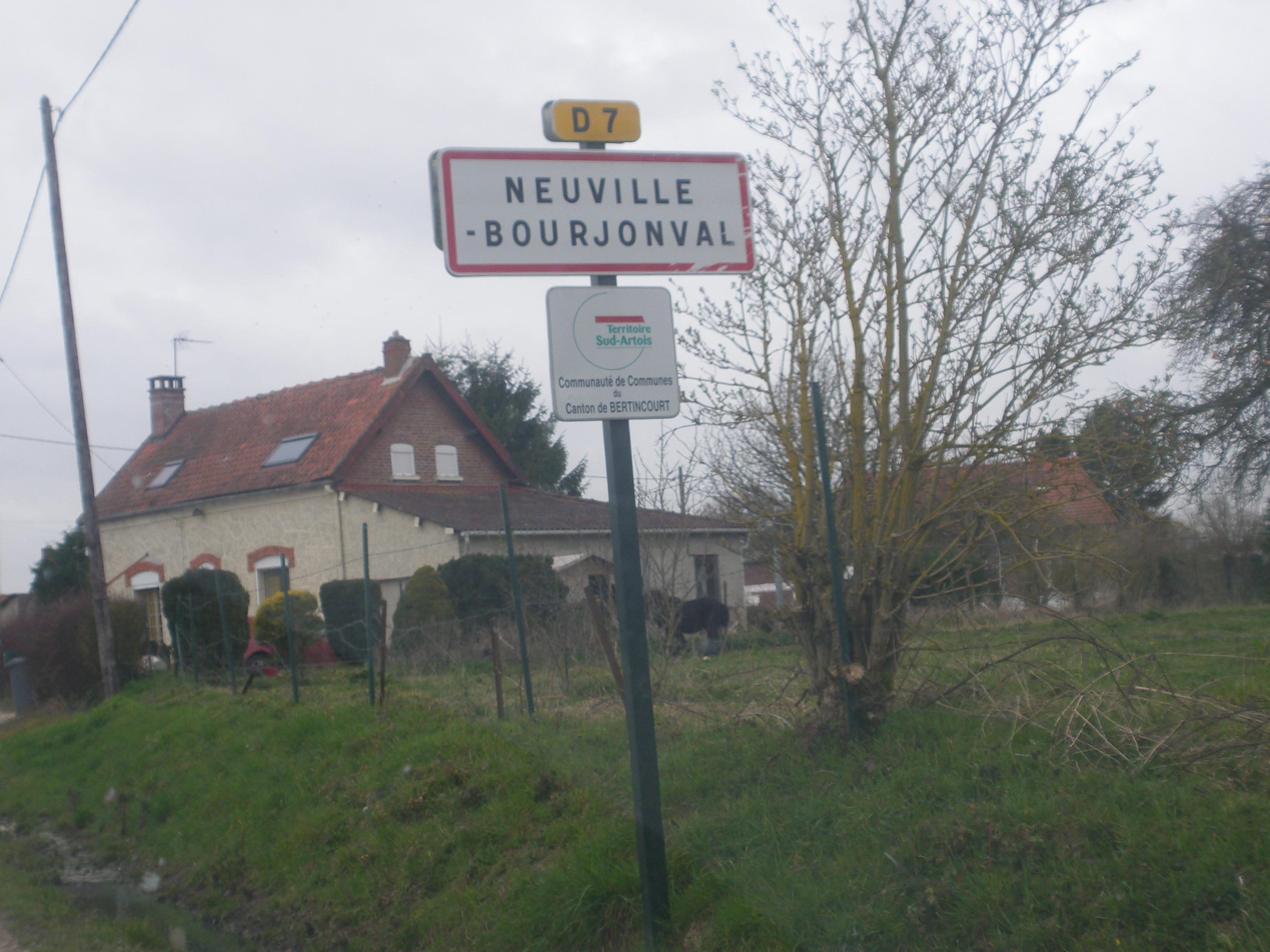 Vue d'un panneau d'entrée de la commune de Neuville-Bourjonval.